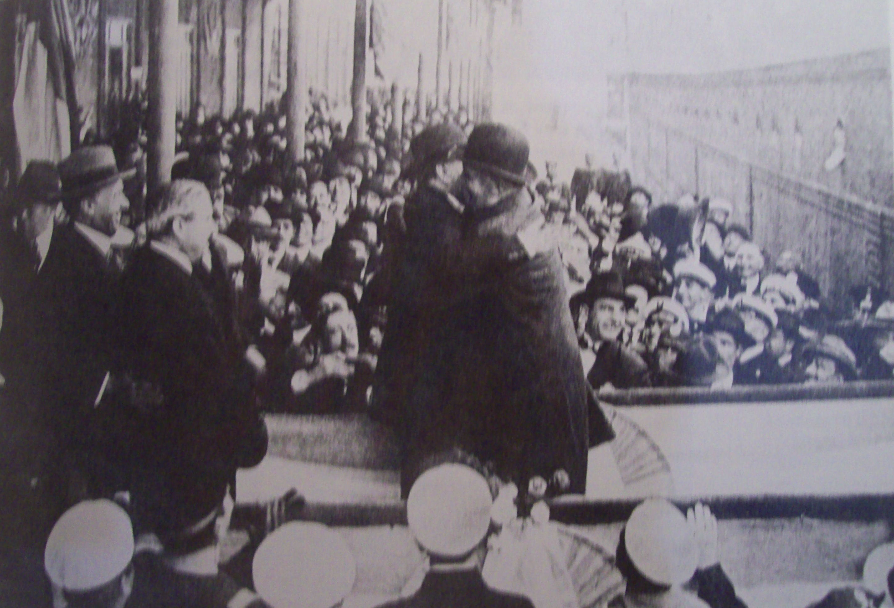 Es una foto del enredado abrazo entre el presidente Yrigoyen y el presidente que esta a punto de asumir, Alvear.